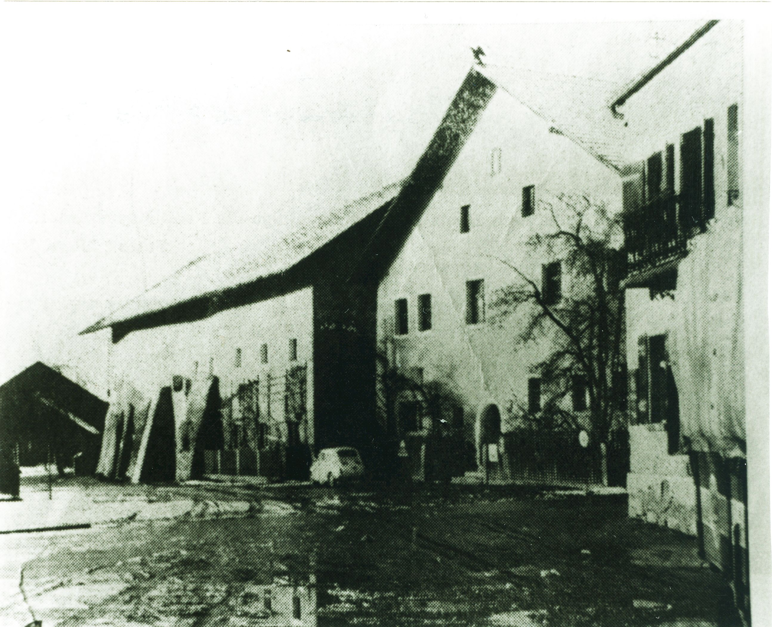 "Gschloessl" im Pemfling